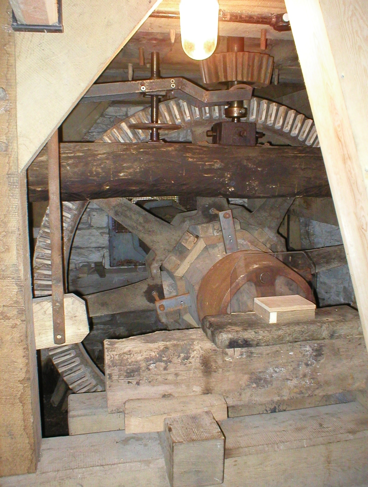 Das Bild zeigt das Eckgetriebe eines der Mahlgänge. Zusehen sind ausgehend von dem massiven Balken in der Bildmitte das senkrecht nach oben abgehende Mühleisen. Das Ritzel ist ausgehängt, so dass trotz sich drehenden Mühlrades nichts angetrieben wird. Links die massive Eisenstange gehört zum Lichtewerk zum anheben und absenken des Läufersteins.